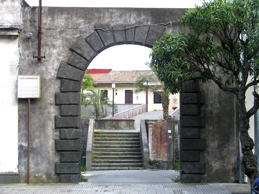 Pisano Etneo - La Cisternazza, portale d'ingresso e cisterna - Foto D. Pennisi